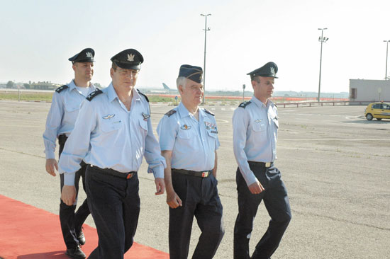 האלוף שקדי עם מפקד חיל-האוויר הספרדי, הגנרל פרנסיסקו חוזה גרסייה דה לה וגה.